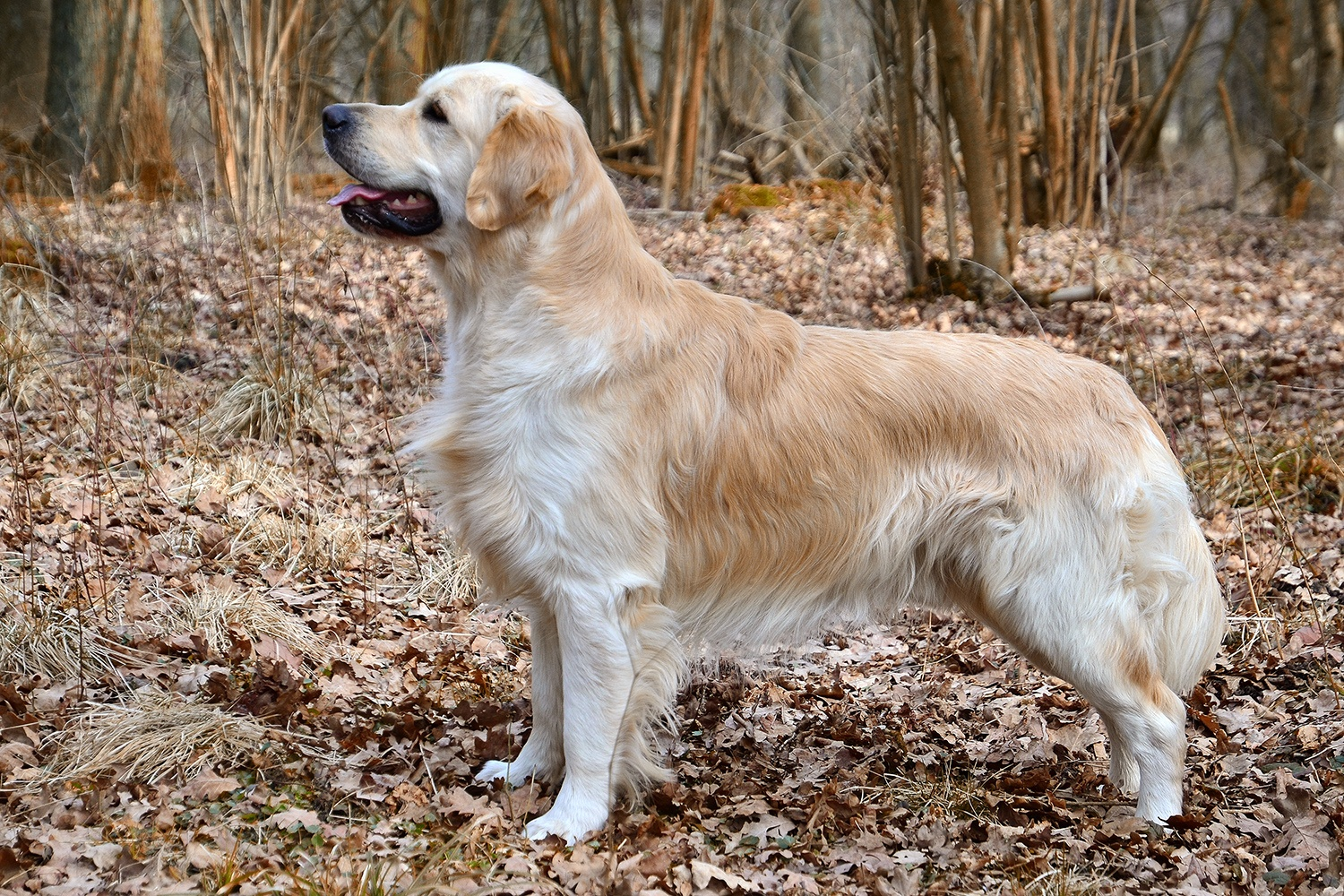 Stehfoto, Datum/Uhrzeit: 24.03.2013 10:22:21